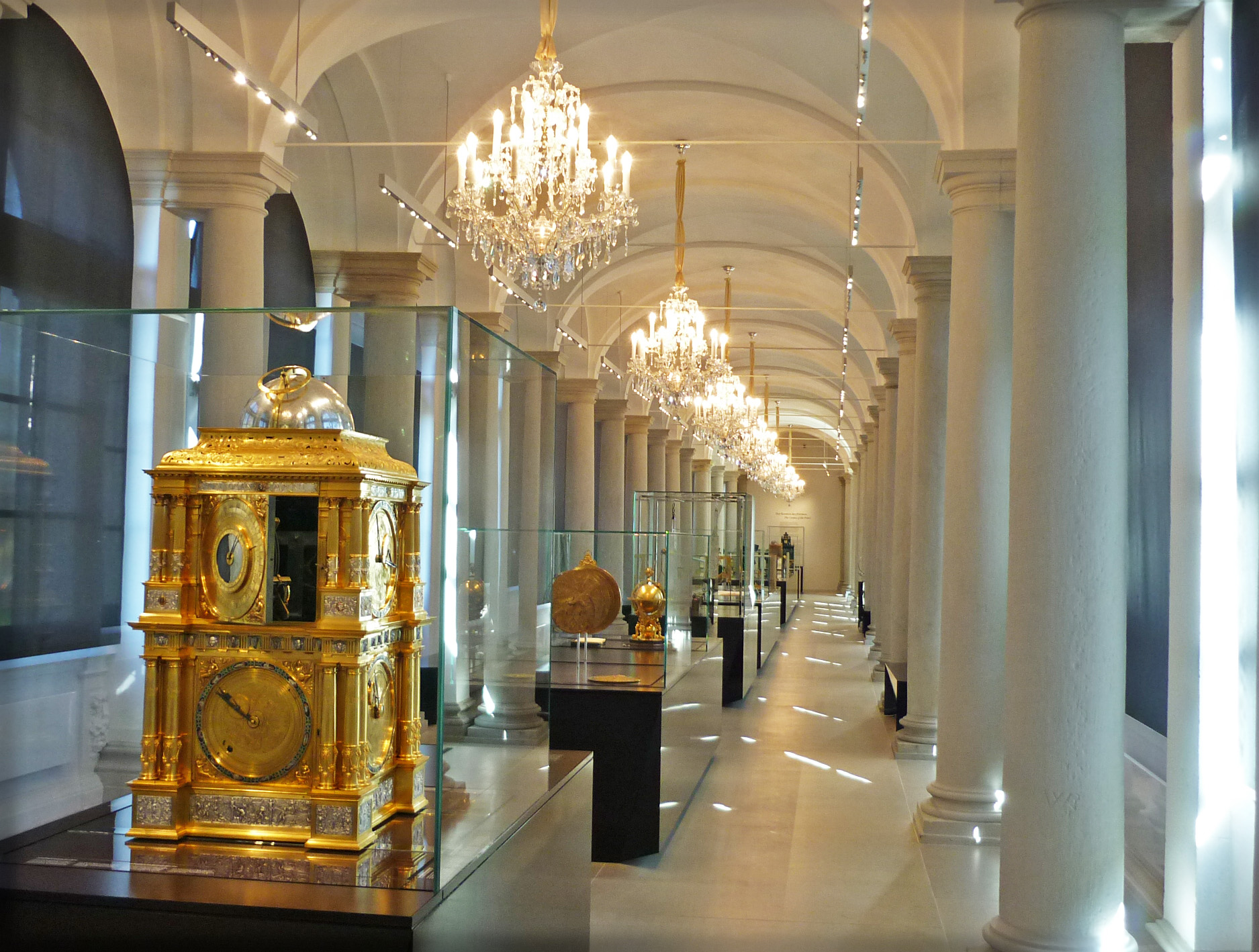 Mathematisch-Physikalischer Salon - Langgalerie (im Zwinger in Dresden, nach der Neueröffnung im April 2013), im Vordergrund die Planetenlaufuhr von Ebert Baldewein (1568)